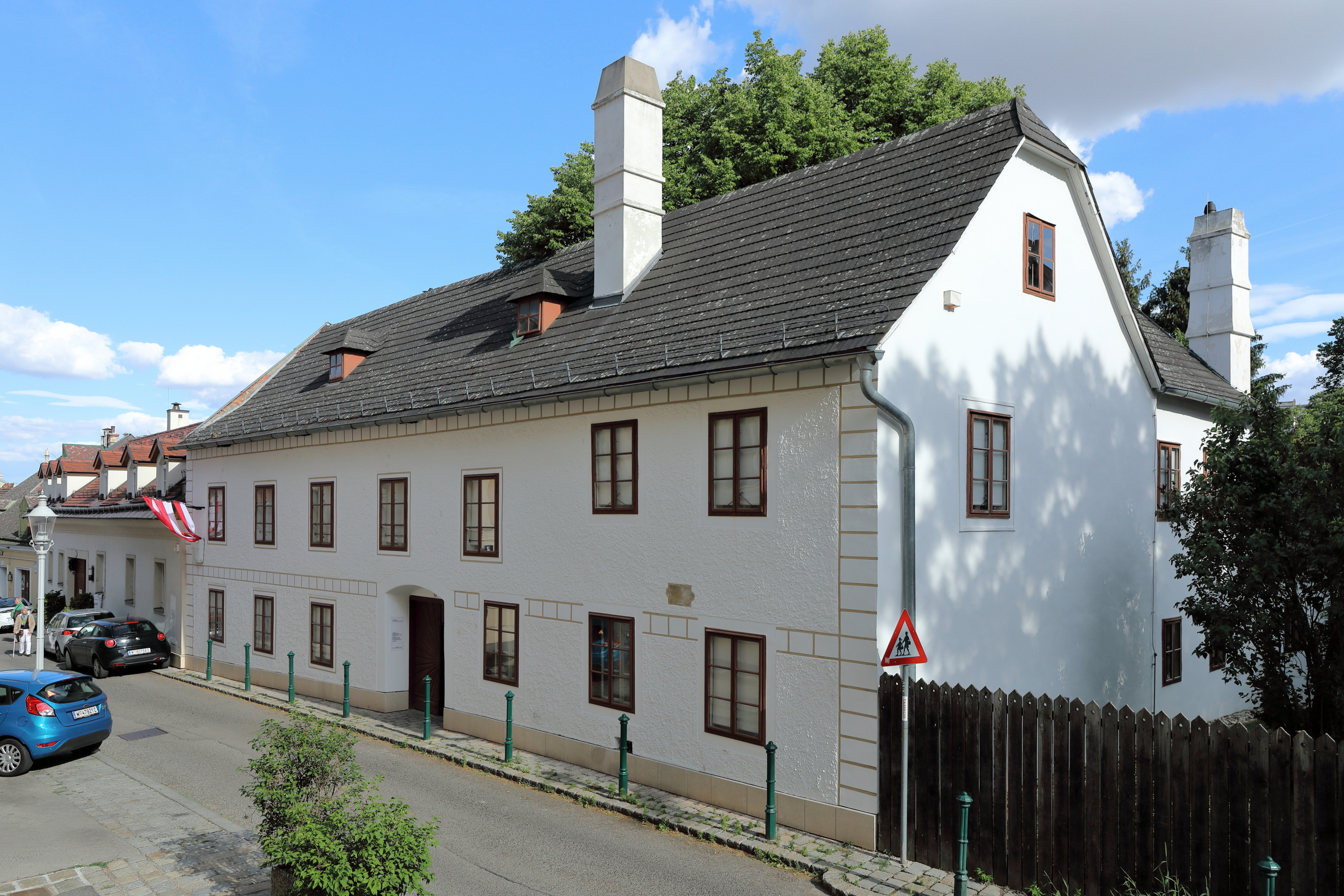 Das Haus an der Adresse Probusgasse 6 in Heiligenstadt, ein Wiener Stadtteil im 19. Bezirk Döbling, in dem Ludwig van Beethoven das sogenannte Heiligenstädter Testament verfasste. Das Haus wurde 1967 von der Stadt Wien angekauft, die darin eine Gedenkstätte einrichtete. 2017 wurde das Haus renoviert und von einer 40 m² umfassenden Gedenkstätte zu einem 265 m² großen Beethoven-Museum erweitert, das von Museen der Stadt Wien betrieben wird.